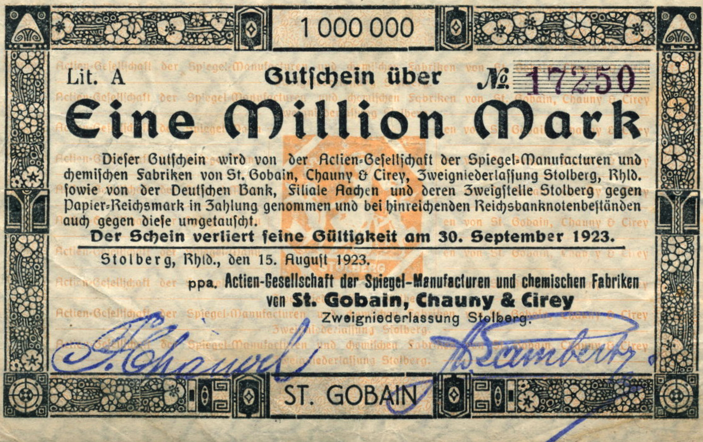 Notgeld der Firma St. Gobain, Chauny und Cirey 1923, ausgestellt Zweigniederlassung Stolberg. Laut dem Einwohnerbuch Aachen 1927 war d. Unterzeichner Werksdirektor von „Stolberg II“, wohl identisch mit der hier gemeinten Zweigstelle.(weitere: s.a.: Möller & Möller, Saint-Gobain, 30, 122; Hamon et al., Saint-Gobain 1665-1937, 184 sowie Sprechsaal für Keramik, Glas, Emaille, Silikate, 1915, 48. Jg., Nr. 3 - 21.